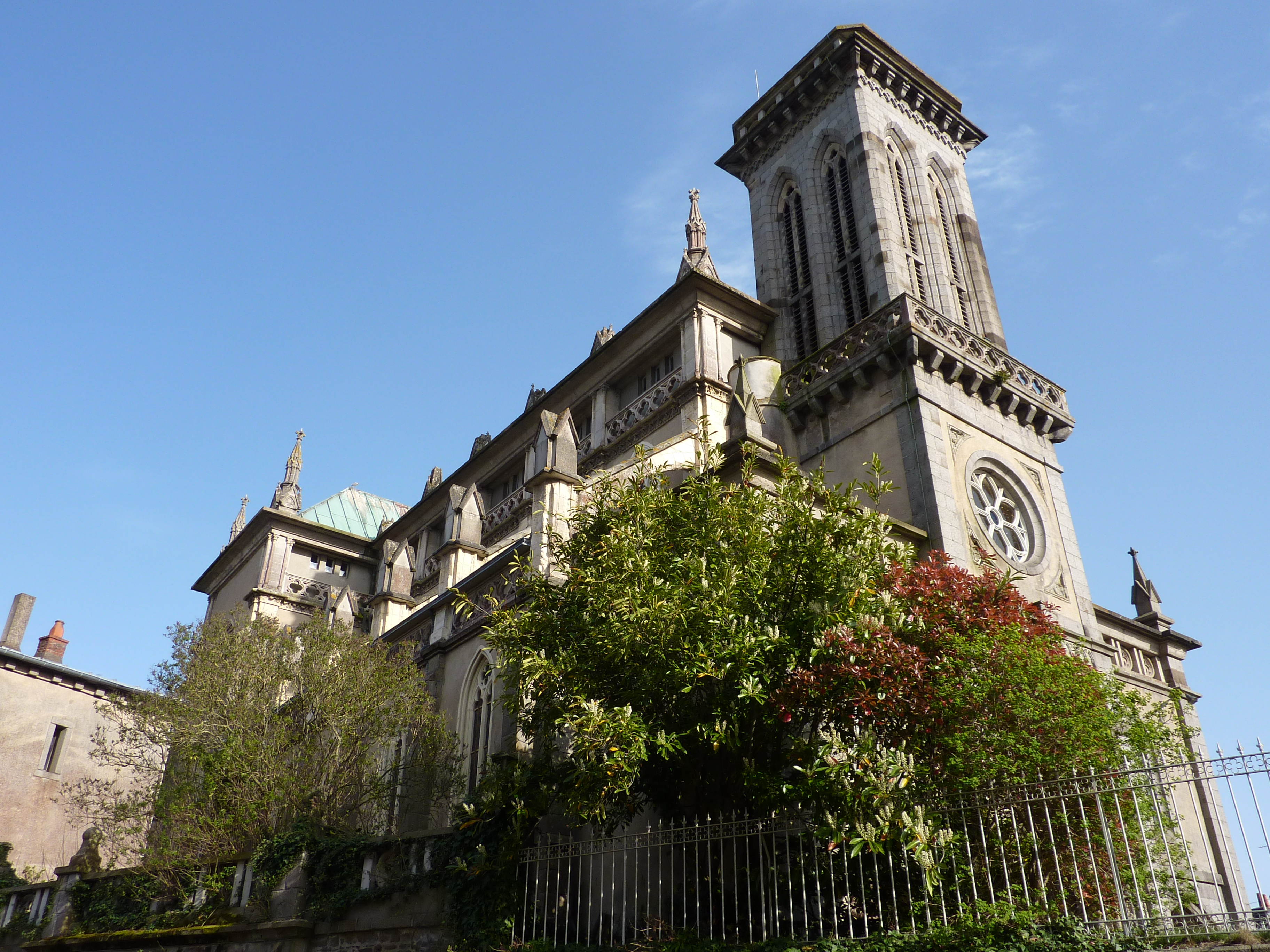 La basilique Notre-Dame d'Espérance à Saint-Brieuc depuis la rue Saint-Pierre.